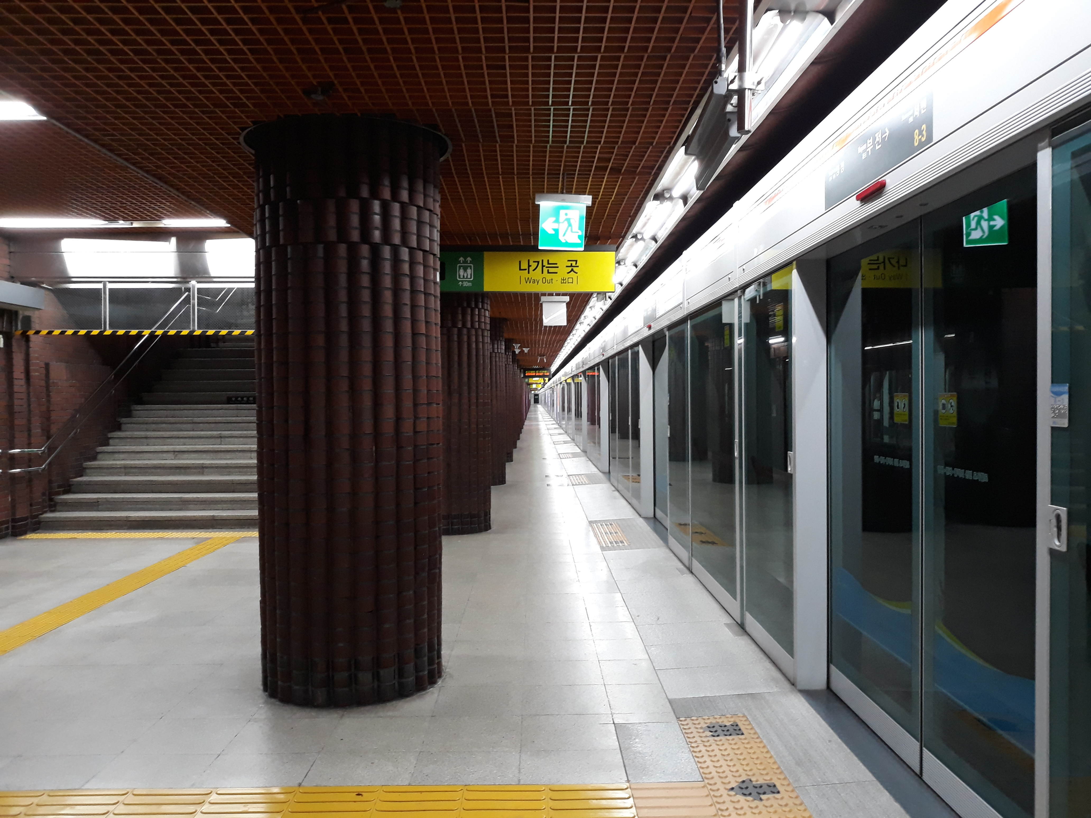 부산 도시철도 1호선 부전역 다대포해수욕장 방면 승강장